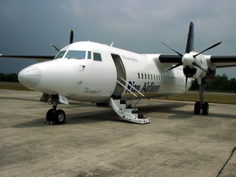 photo d'avion